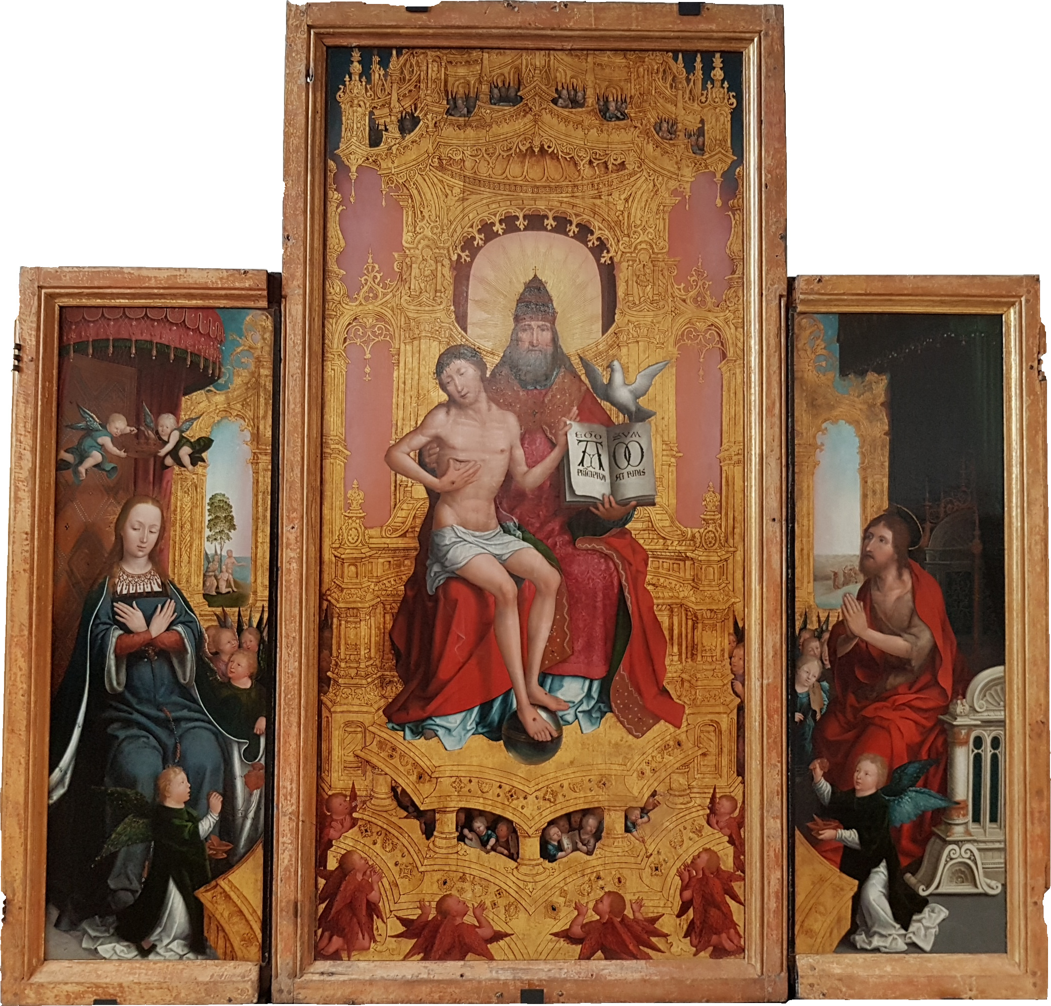 Trois panneaux apparaissant au centre dans le retable ouvert. La Trinité encadrée par la Vierge et Jean-Baptiste. Partie du polyptyque d'Anchin, peint par Jehan Bellegambe vers 1510 (musée de la Chartreuse de Douai).